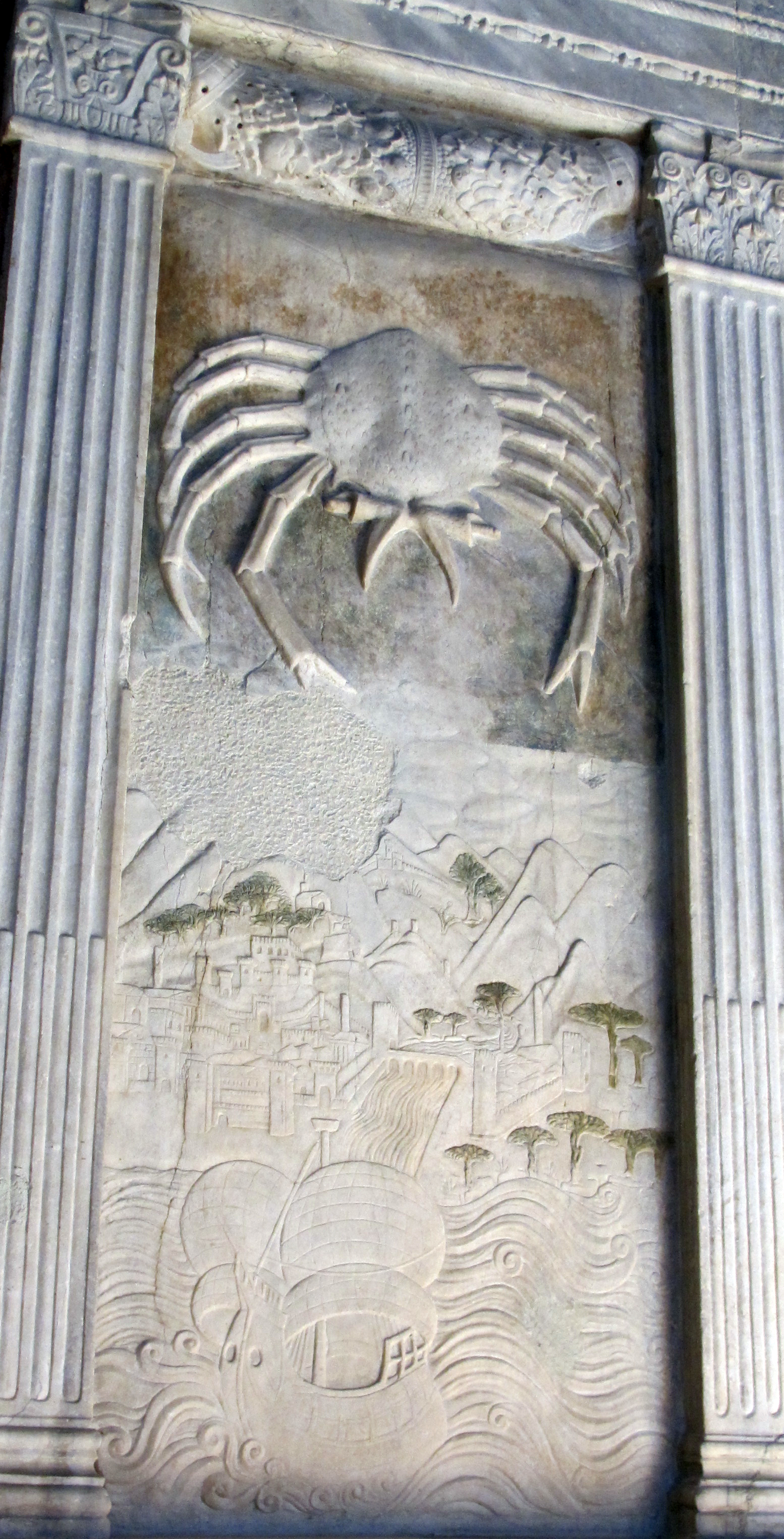 Tempio Malatestiano - MIBAC This is a photo of a monument which is part of cultural heritage of Italy.